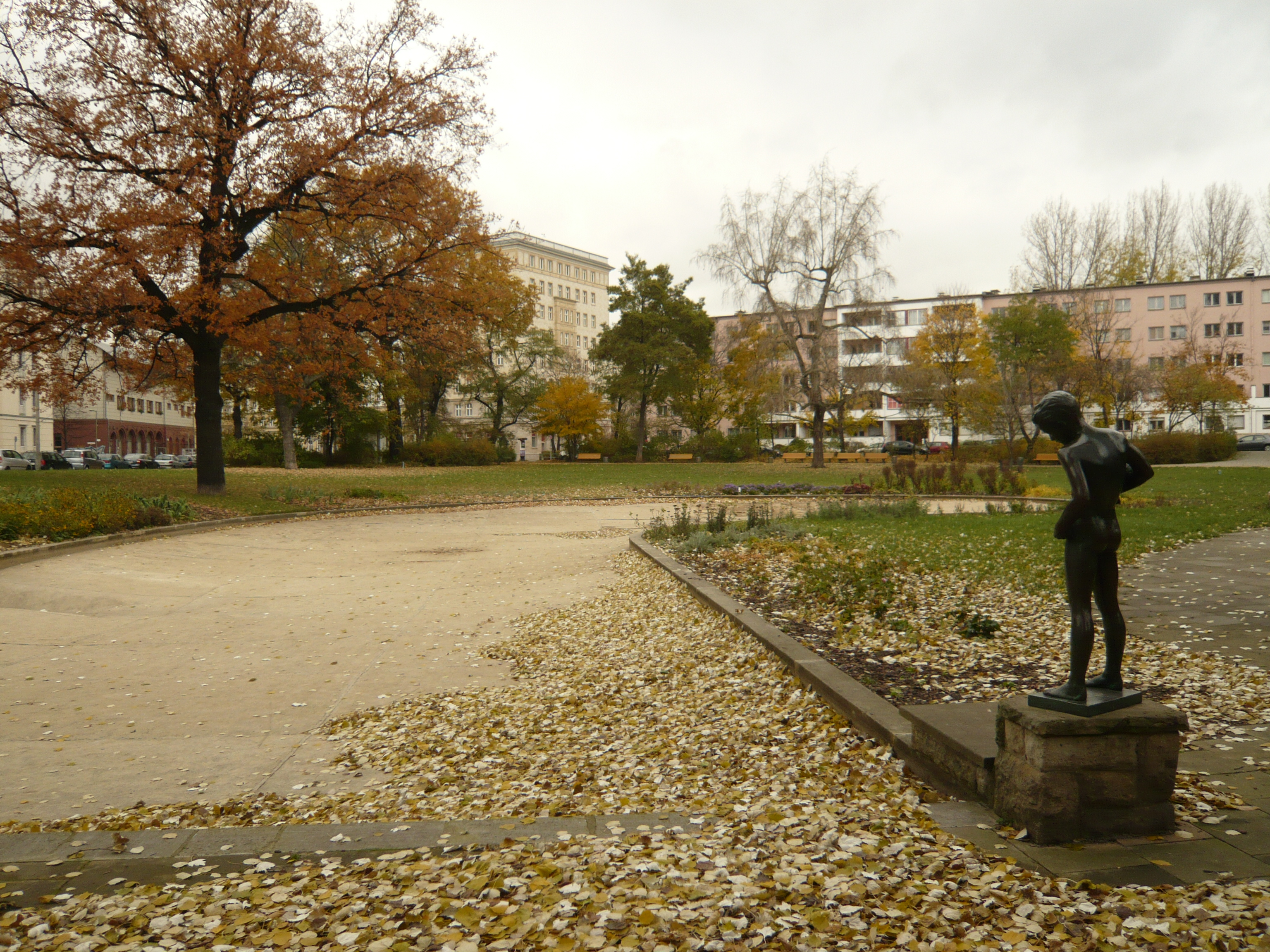 Weberwiese im Ortsteil Berlin-Friedrichshain/